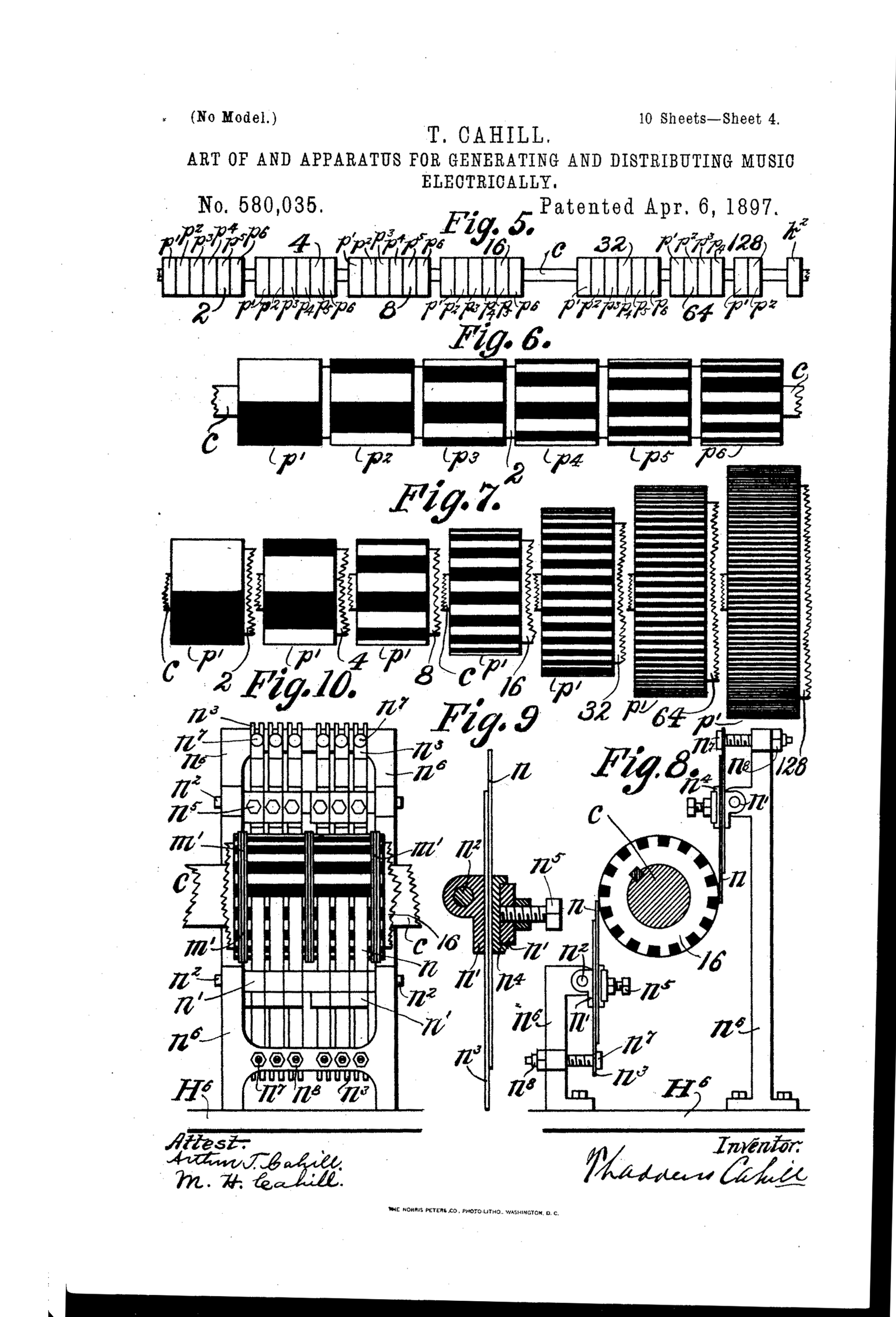 Extrait du brevet 58035 du telharmonium de 1897, illustrant le principe de la roue phonique